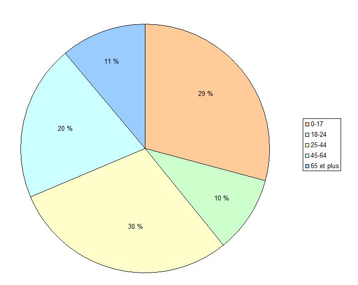 Répartition, selon la tranche d'âge, de la population de Hartford (Michigan, Etats-Unis)